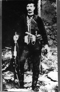 Павлос Павлидакис